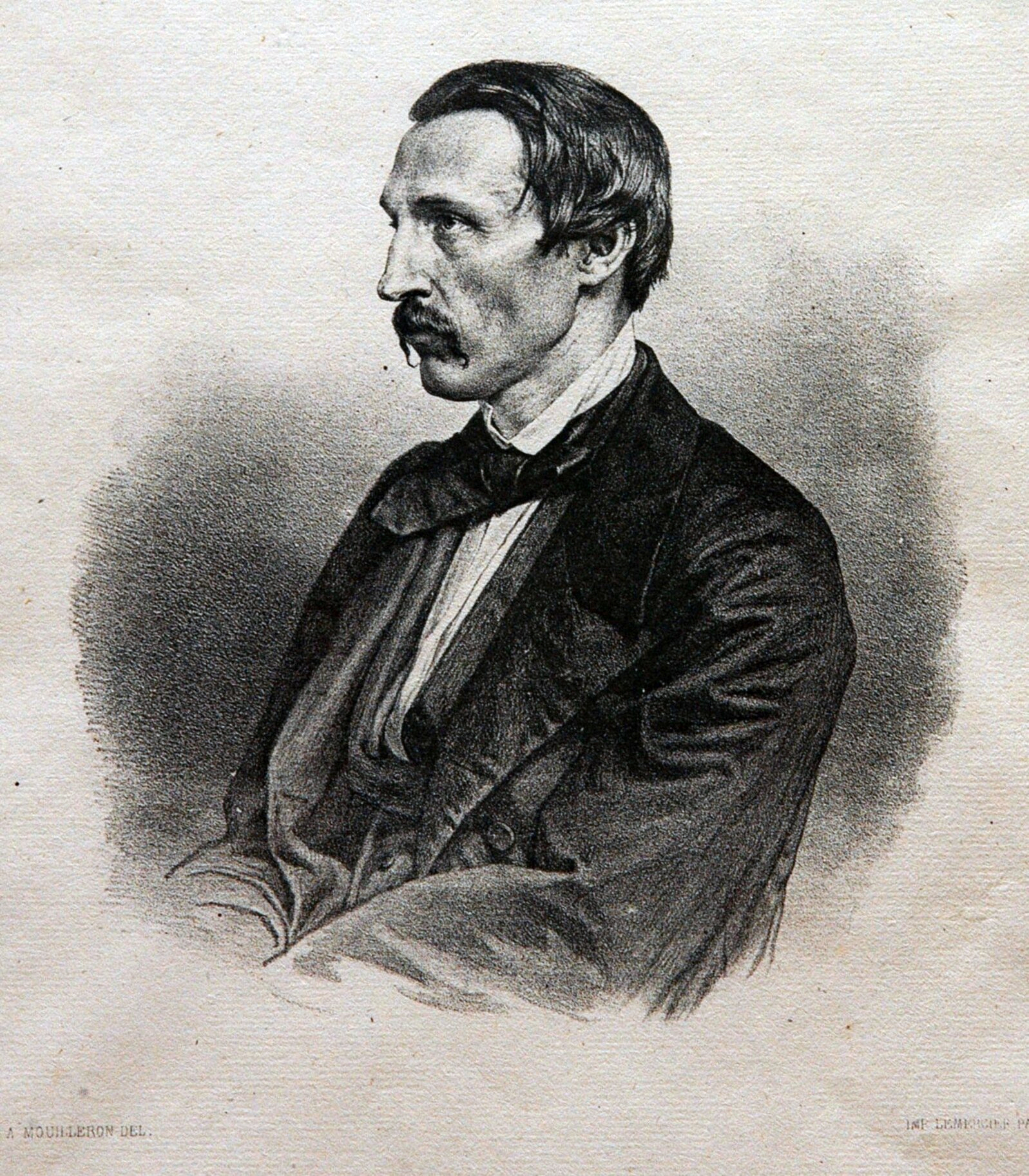 Пантелеймон Куліш. Літографія. Обрізаний варіант. Ближчий до оригіналу - [1]. На літографії дарчий напис І. Хільчевському з особистим підписом П. Куліша